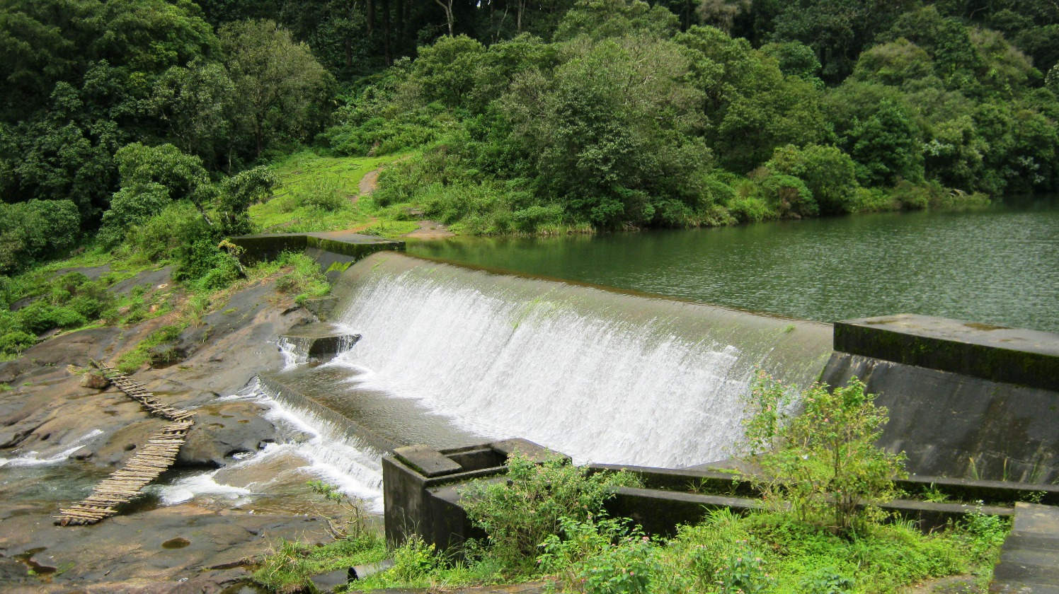 Pamba Dam @ Gavi